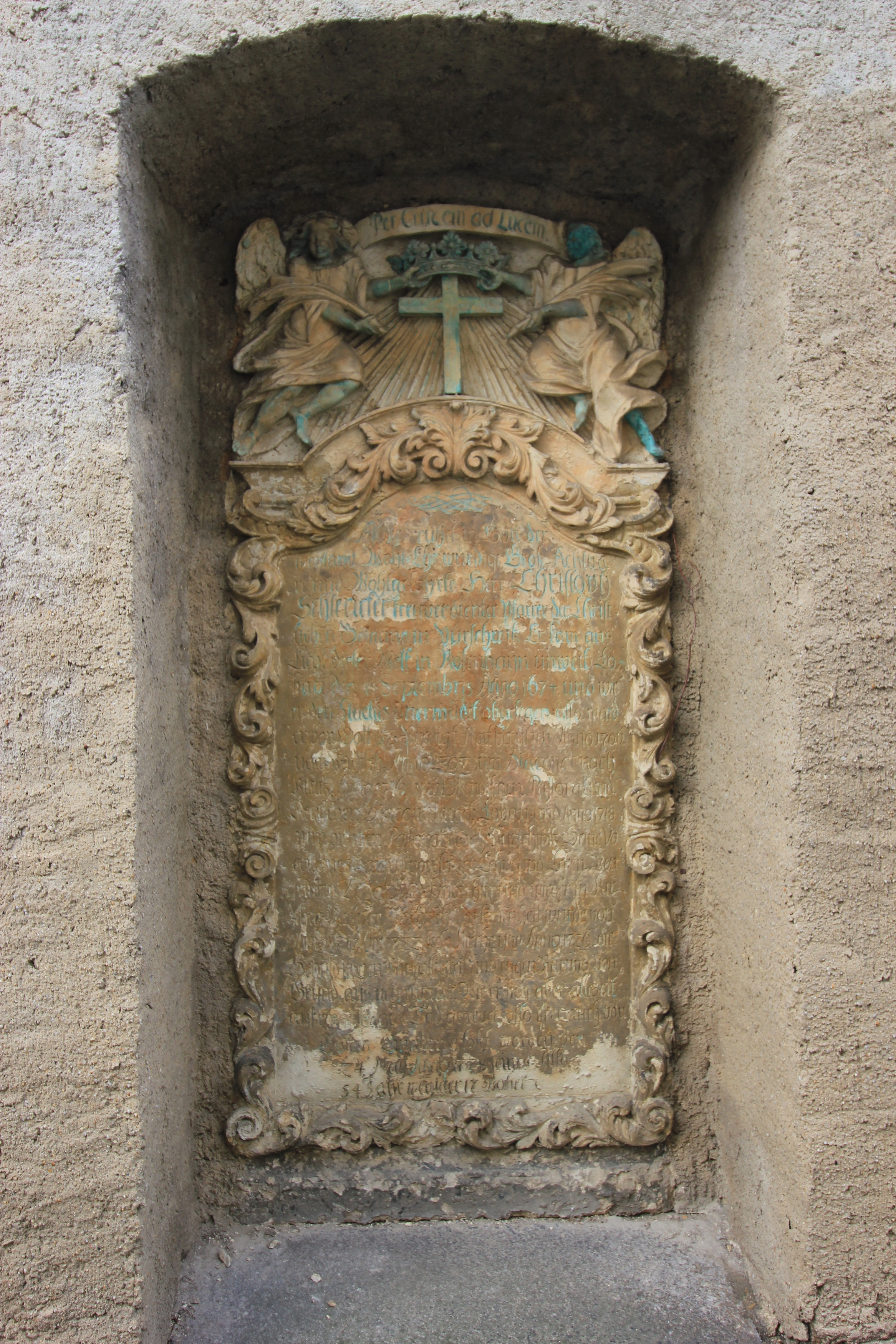 Hornjoserbsce: Historiski narowny pomnik fararja Chryše Šlenkarja na Poršiskim kěrchowje